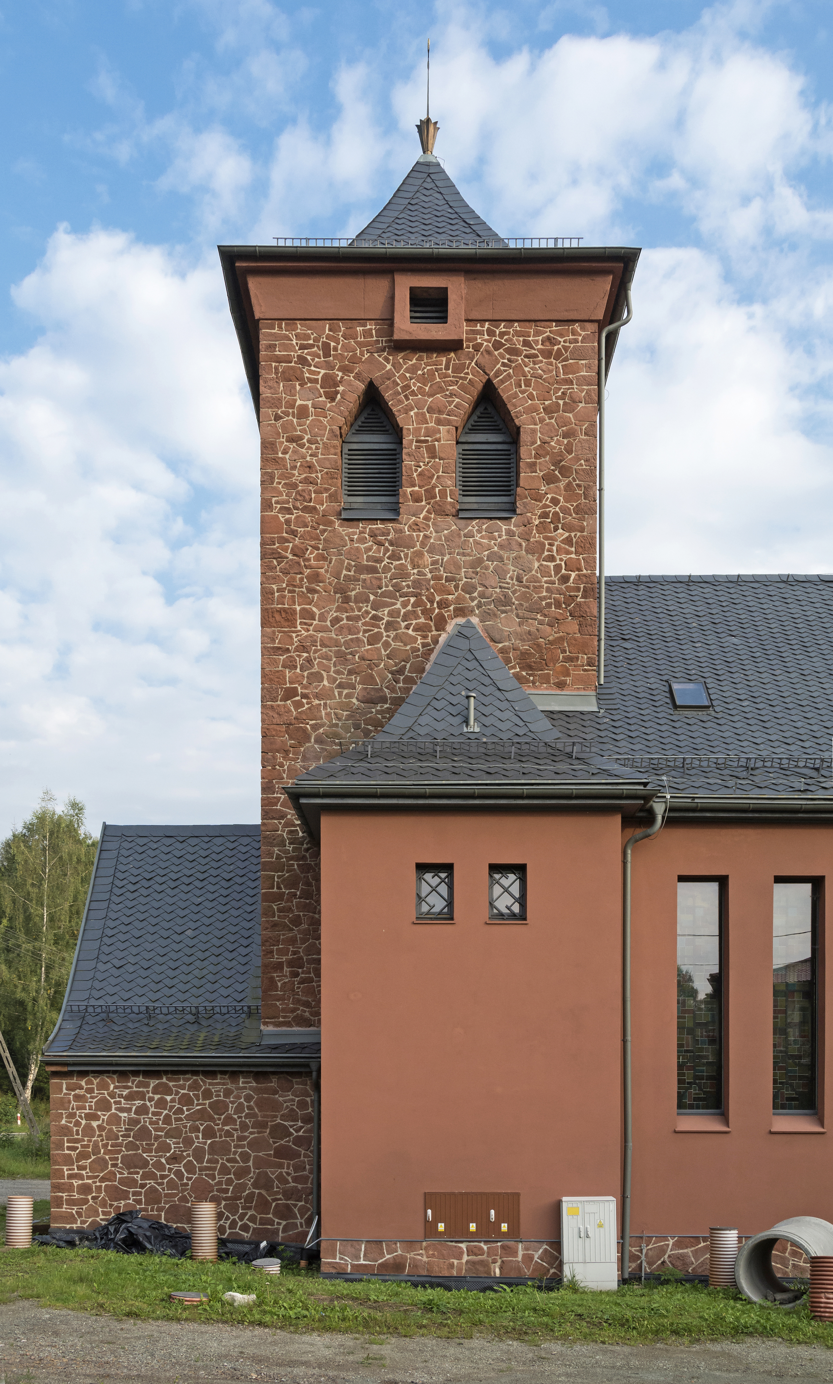 Ludwikowice Kłodzkie, kościół ewangelicki p.w. Błogosławieństwa Pańskiego, ob. Muzeum Ziemi Sowiogórskiej, 1929-1930